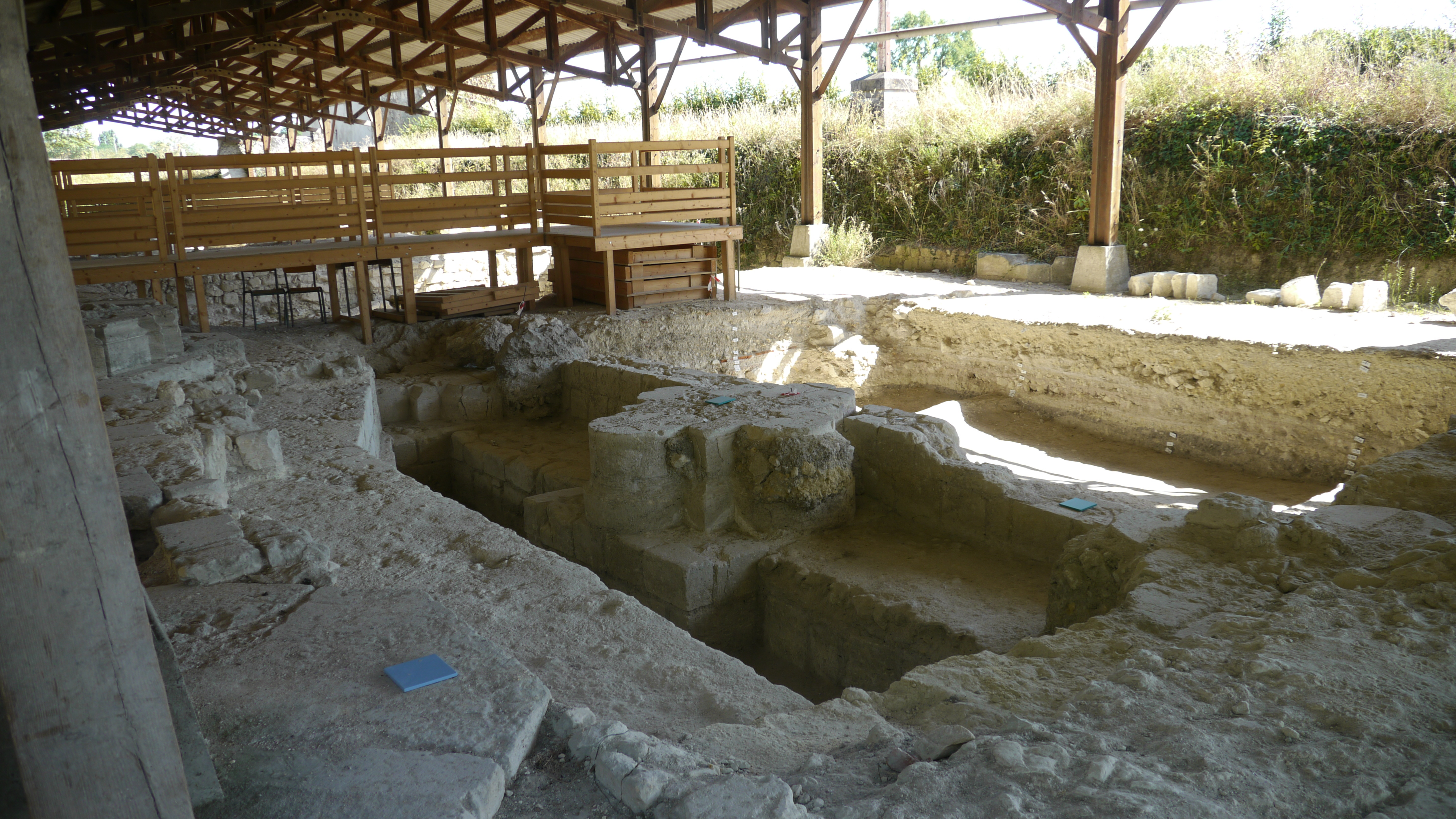 Abbaye de Marmoutier 3/9